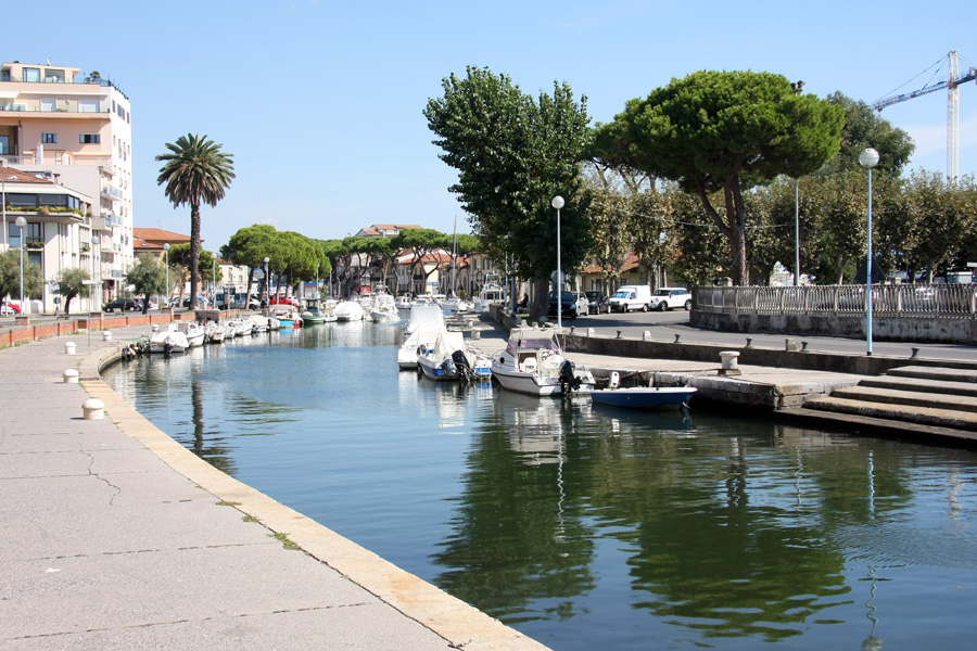 Canale della Burlamacca a Viareggio